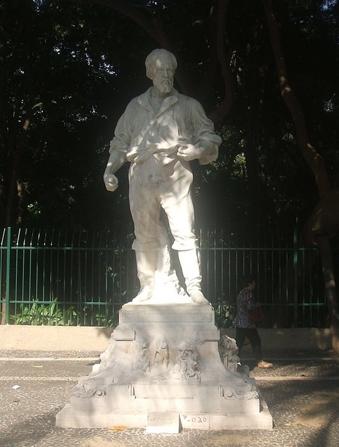 Luigi Brizzolara - Anhanguera, escultura em mármore, em frente ao Parque Trianon, na Av. Paulista, São Paulo, Brasil.